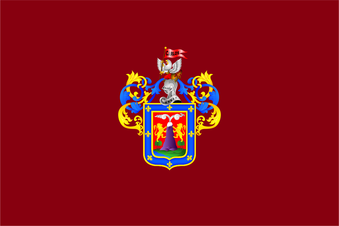 Distrito de Arequipa - Provincia de Arequipá - Región Arequipa